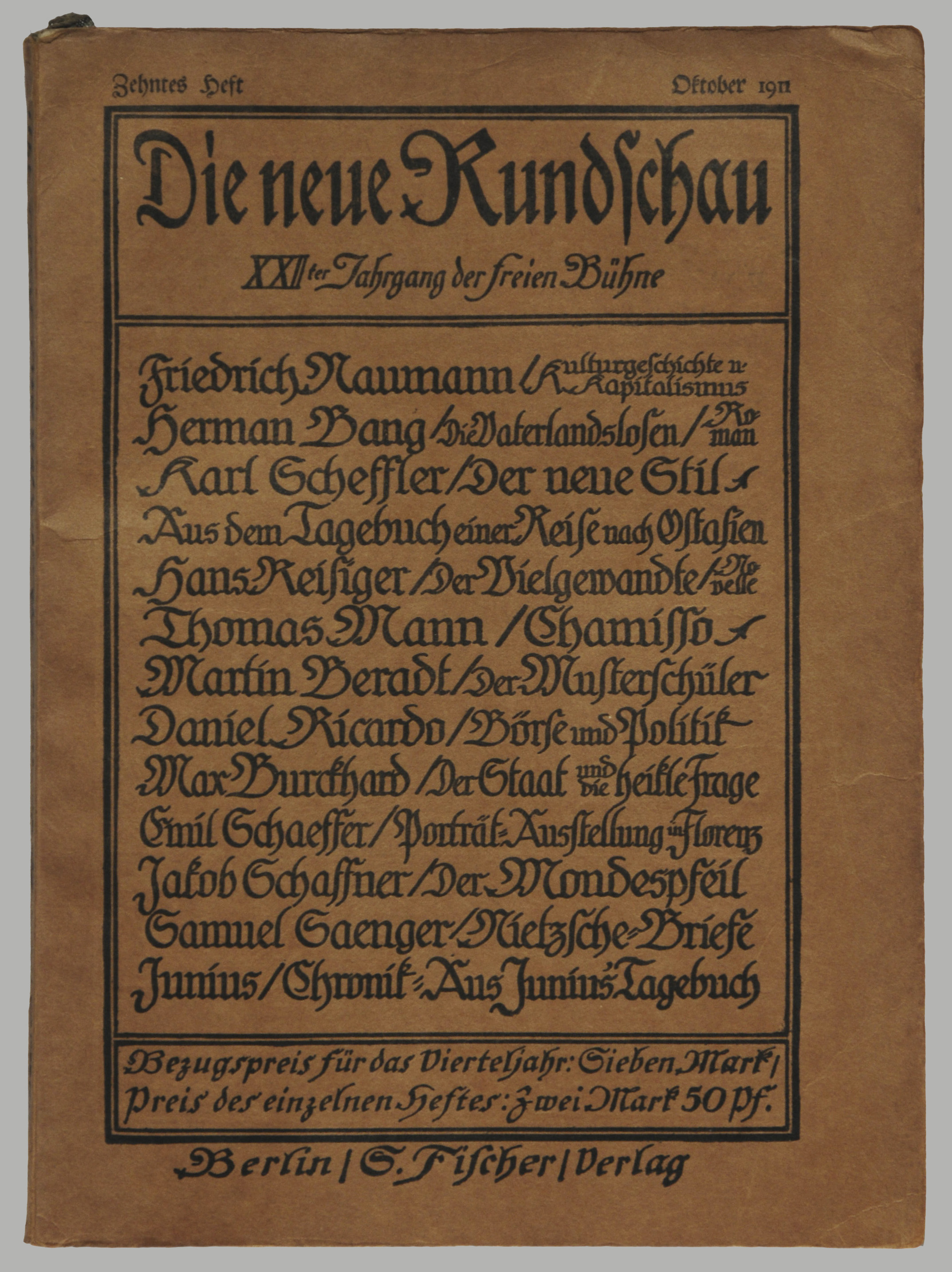 Thomas Mann: Chamisso [Essay]. In: Die neue Rundschau 1911 (Verlag S. Fischer Berlin) Sammlung H.-P.Haack, Foto H.-P.Haack.